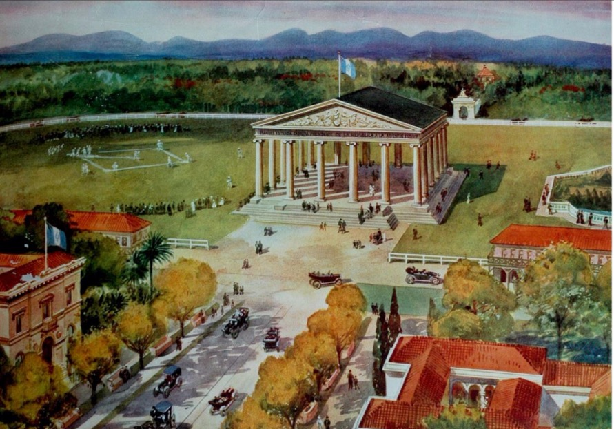 Templo de Minerva y parque de Beisbol a principios del siglo XX